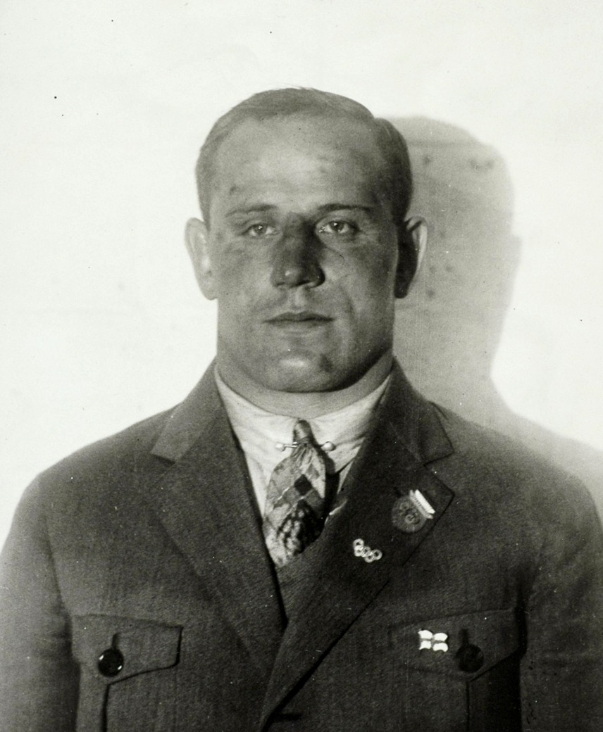 Sport. Sport, Olympische Spelen Amsterdam, 1928 : Olympisch kampioen Grieks/Romeins worstelen tot 75 kg, de Fin Vainö Kokkinen.